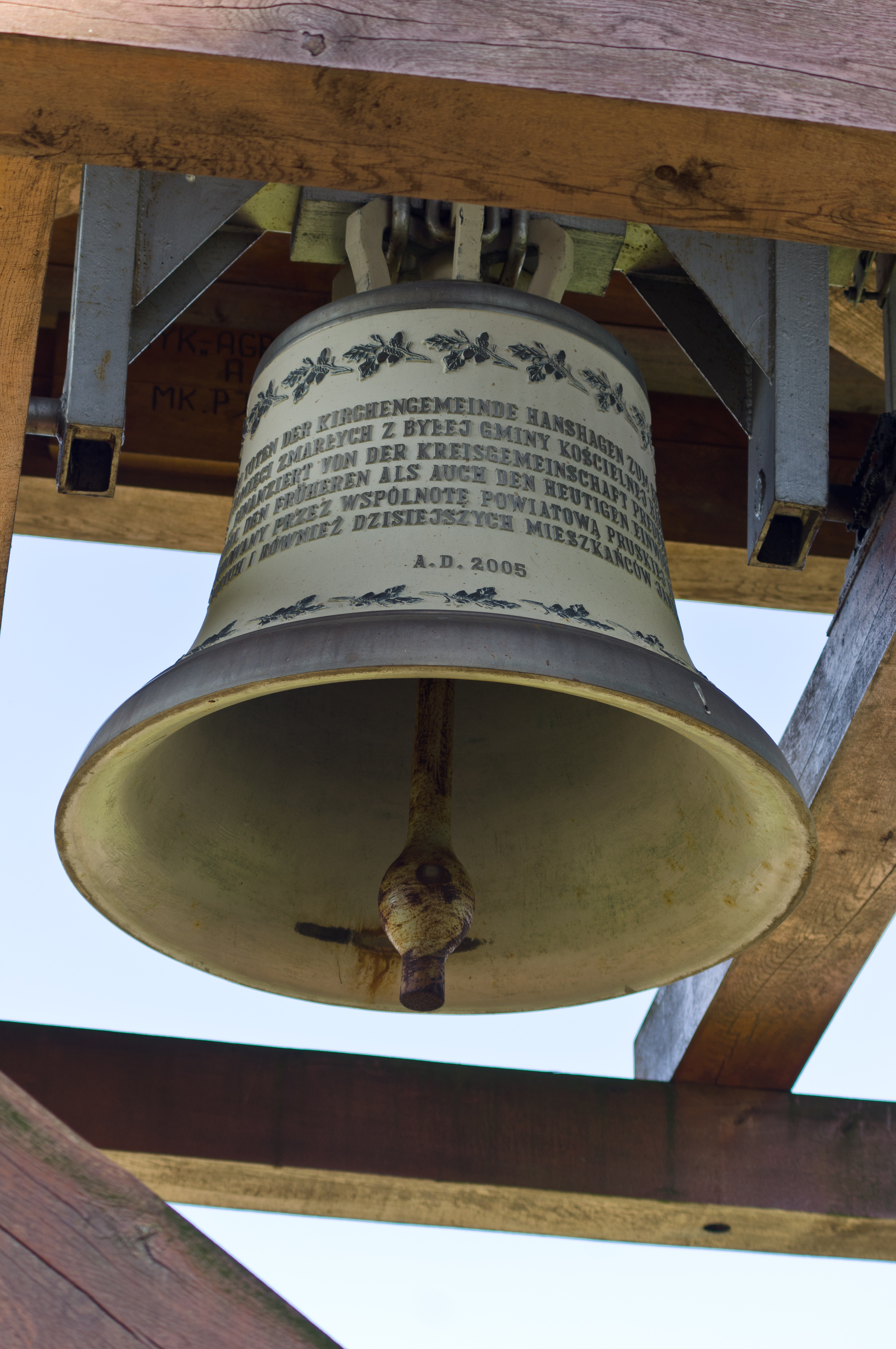 Dzwon przy zabytkowej kaplicy p.w. MB Różańcowej w Janikowie (województwo warmińsko-mazurskie).